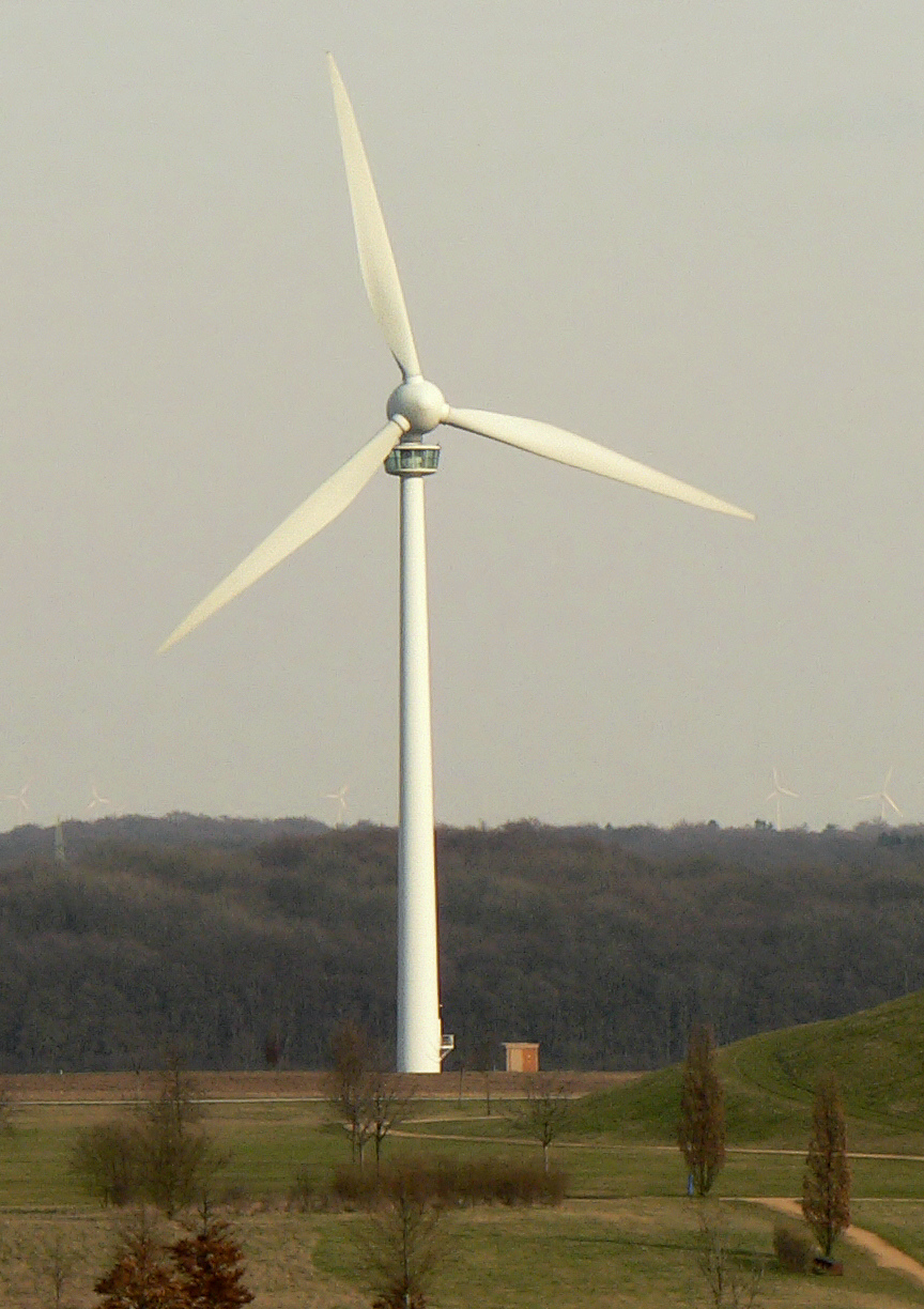 Windkraftanlage Kronsberg Süd